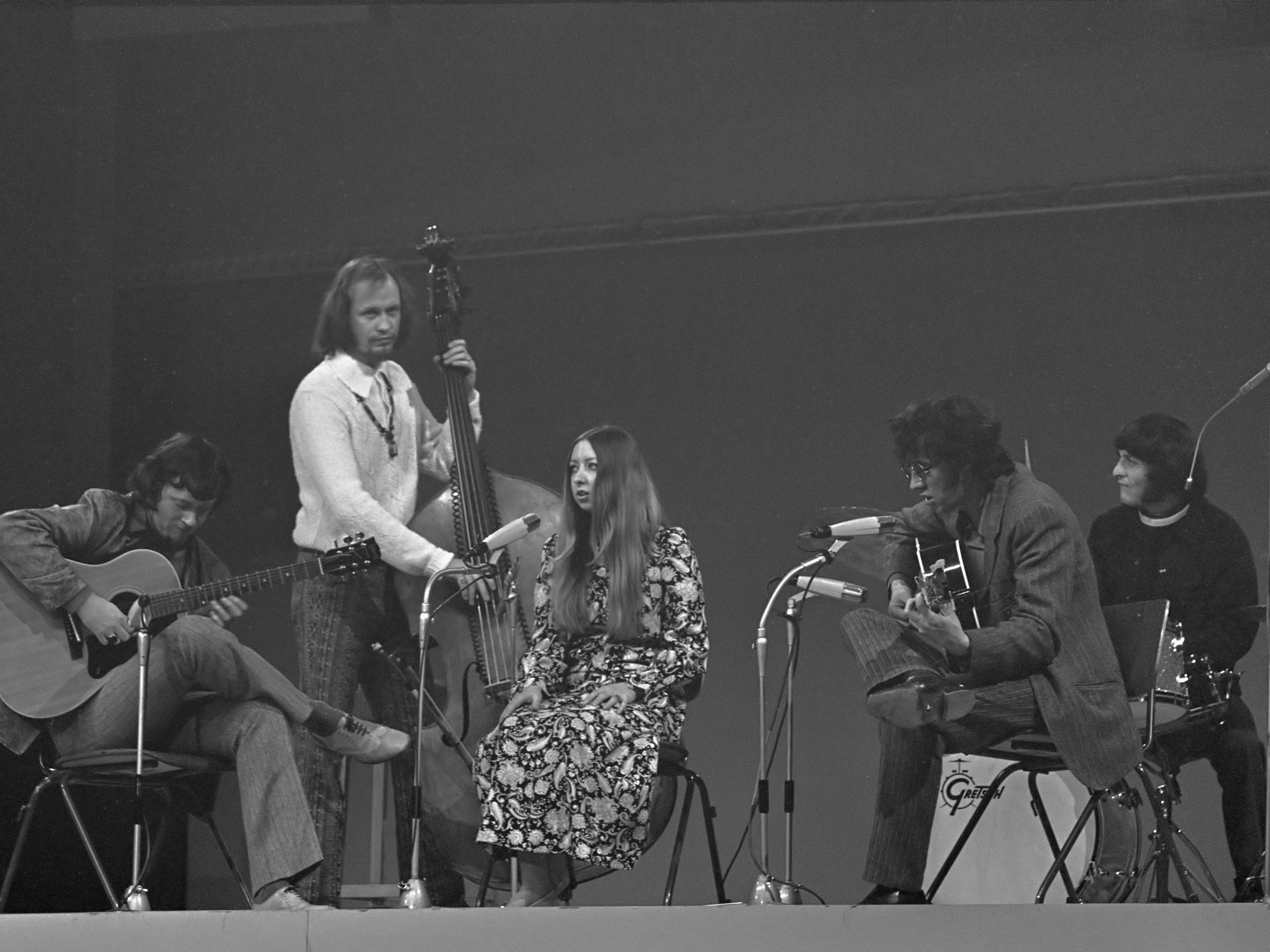 Repetitie voor het Grand Gala du Disque in Congreshal van de RAI. De Engelse folkgroup Pentangle. 6 maart 1969